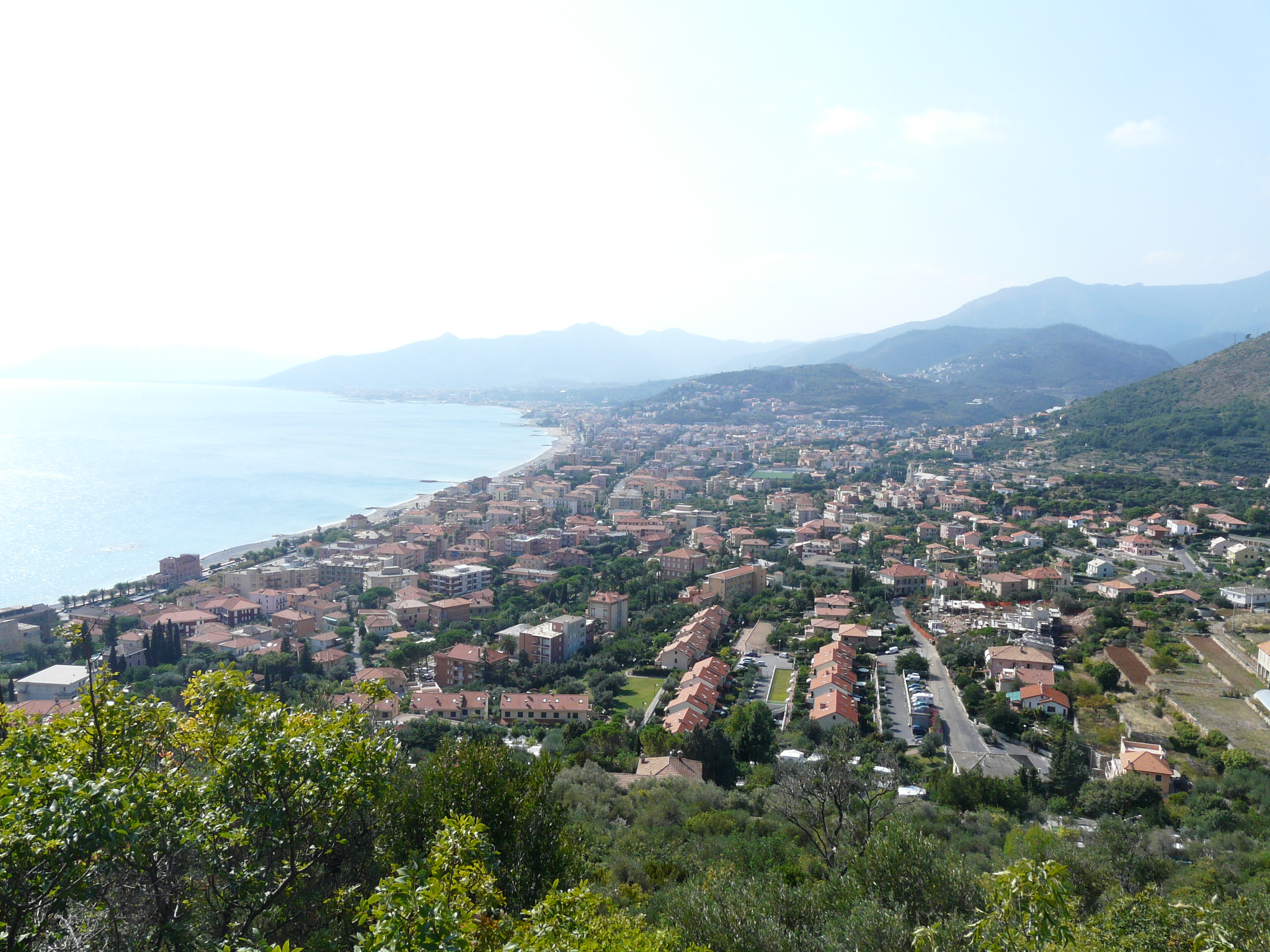 Panorama di Borgio e Pietra Ligure, Liguria, Italia